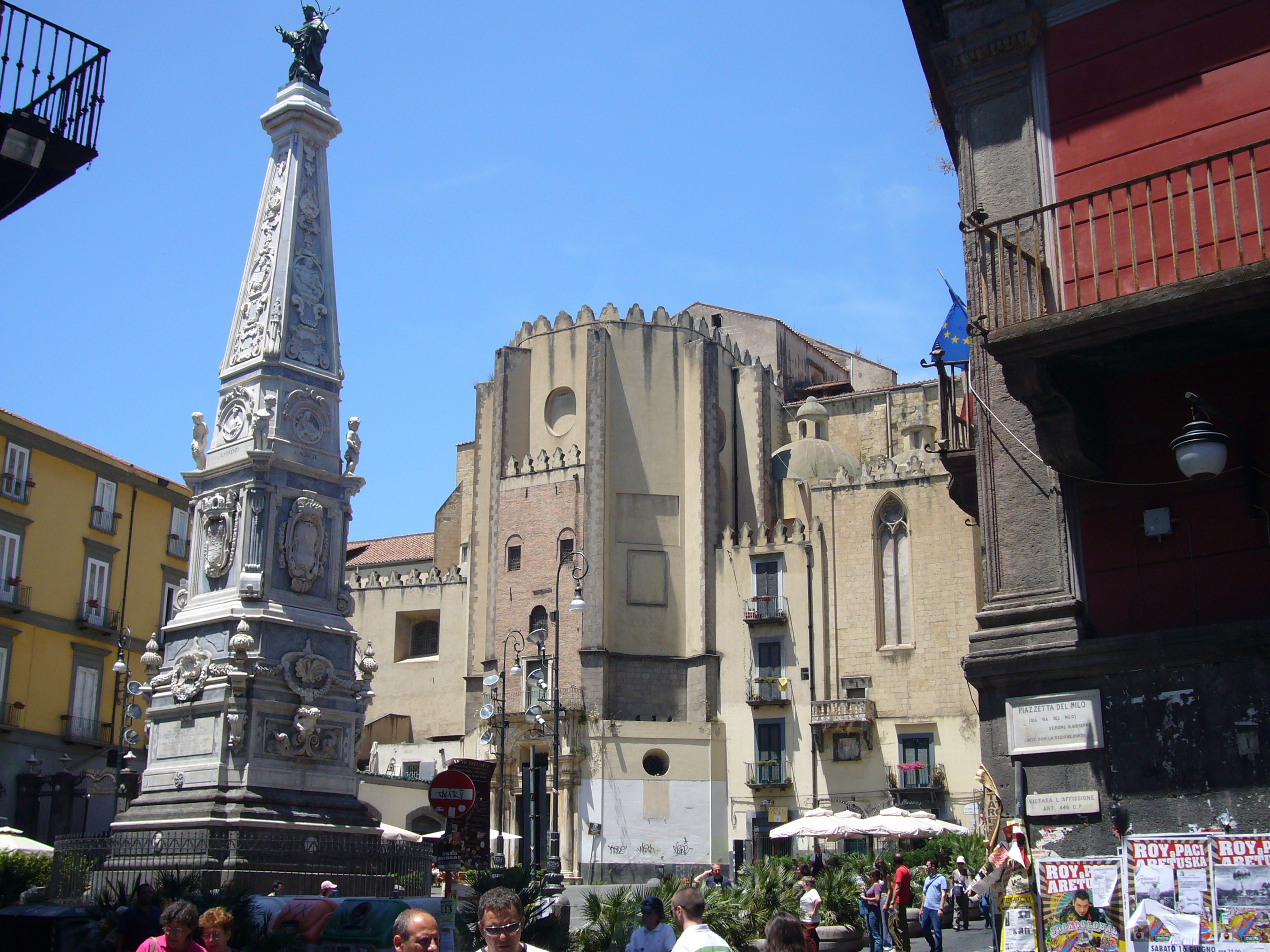 Napoli, piazza di San Domenico Maggiore, con abside della chiesa e guglia di San Domenico.